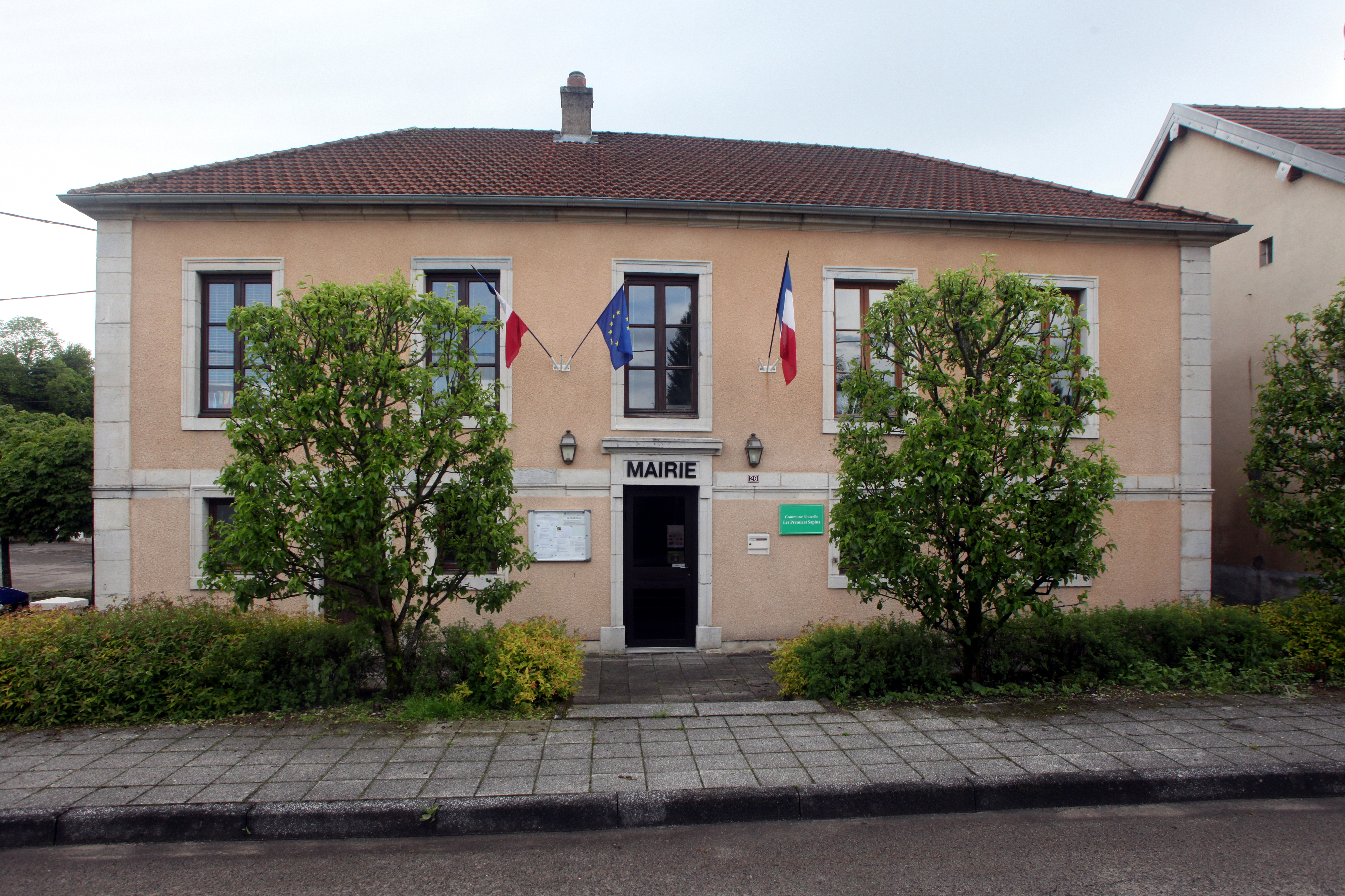 Mairie de Nods (Doubs).